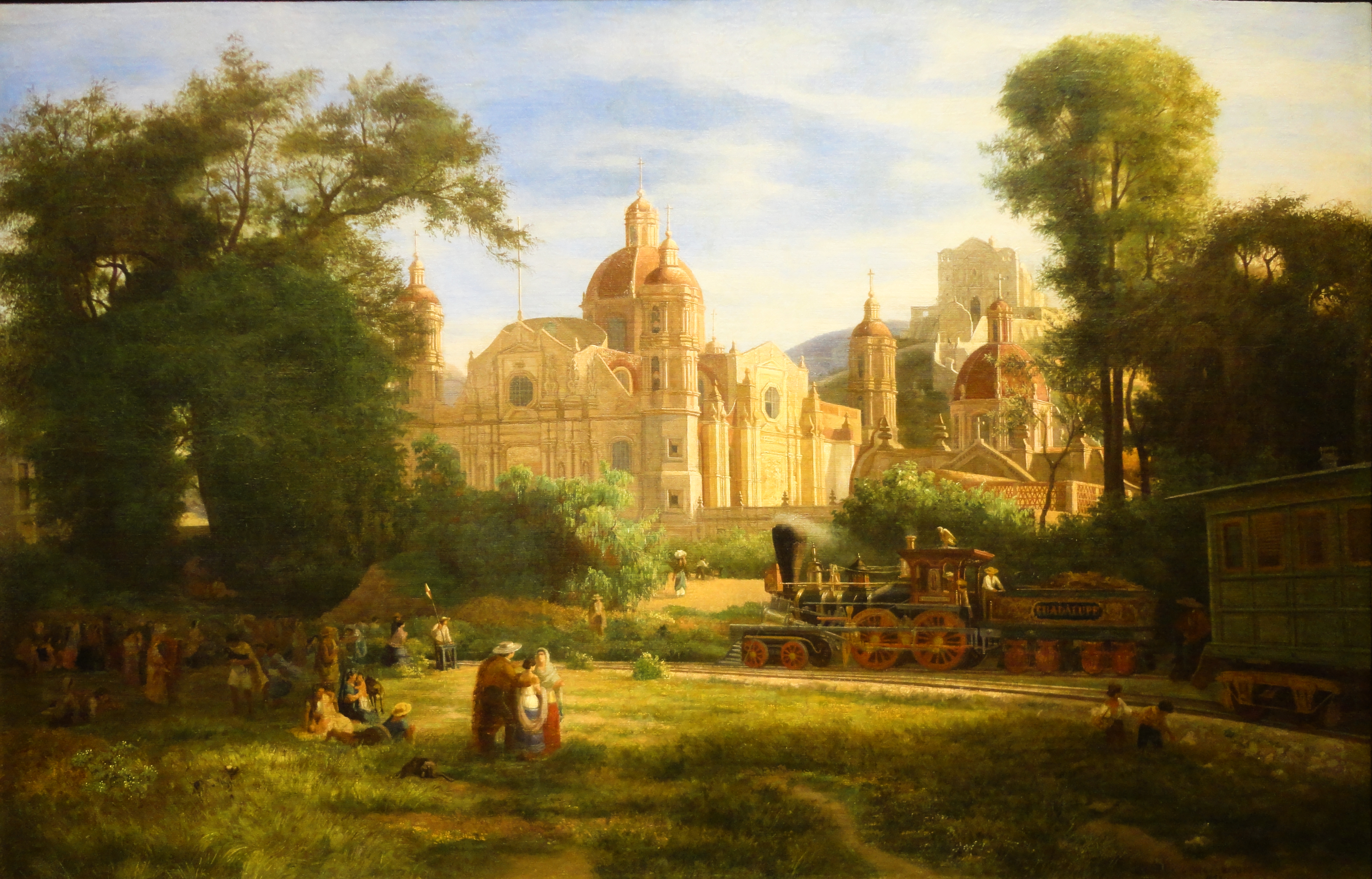 La Colegiata de Guadalupe, 1859 - Luis Coto